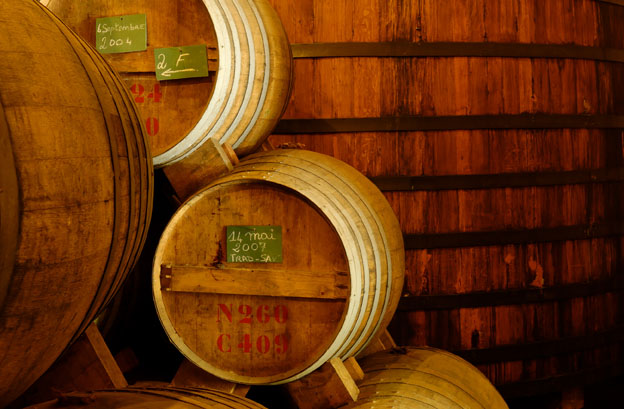 Savanna, La Réunion chais fut et foudre de chêne